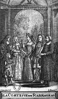 Иллюстрация к театральной комедии-балету Мольера "Графиня д’Эскарбанья"